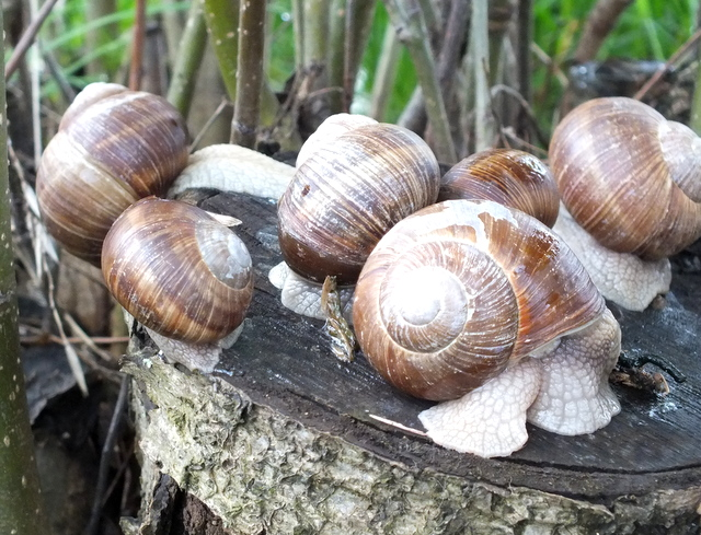 Ślimaki winniczki